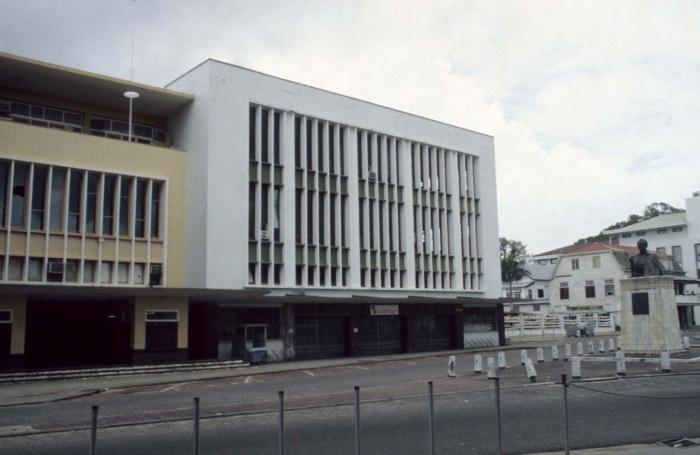 Dia. Postkantoor Surpost op het kerkplein